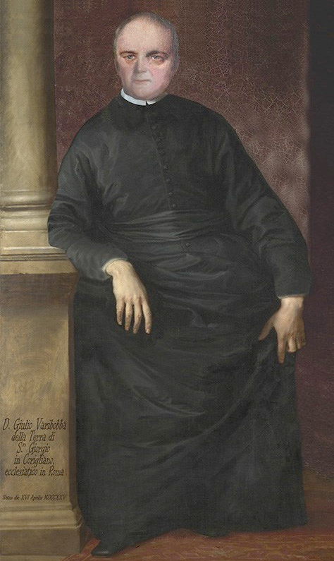 Giulio Variboba (1725 – 1788)